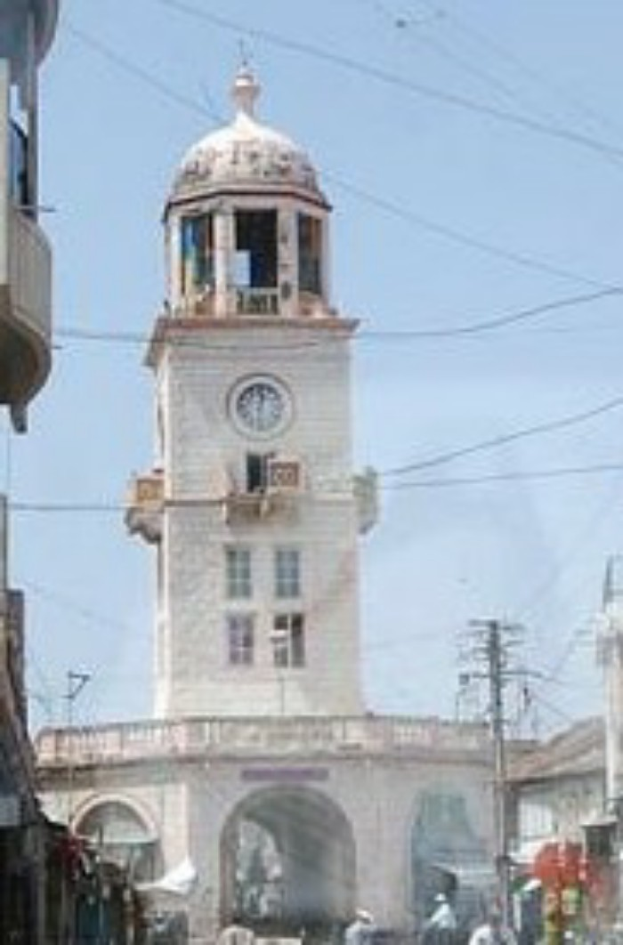 ગુજરાતી: અમરેલીનો અૈતિહાસીક ટાવર